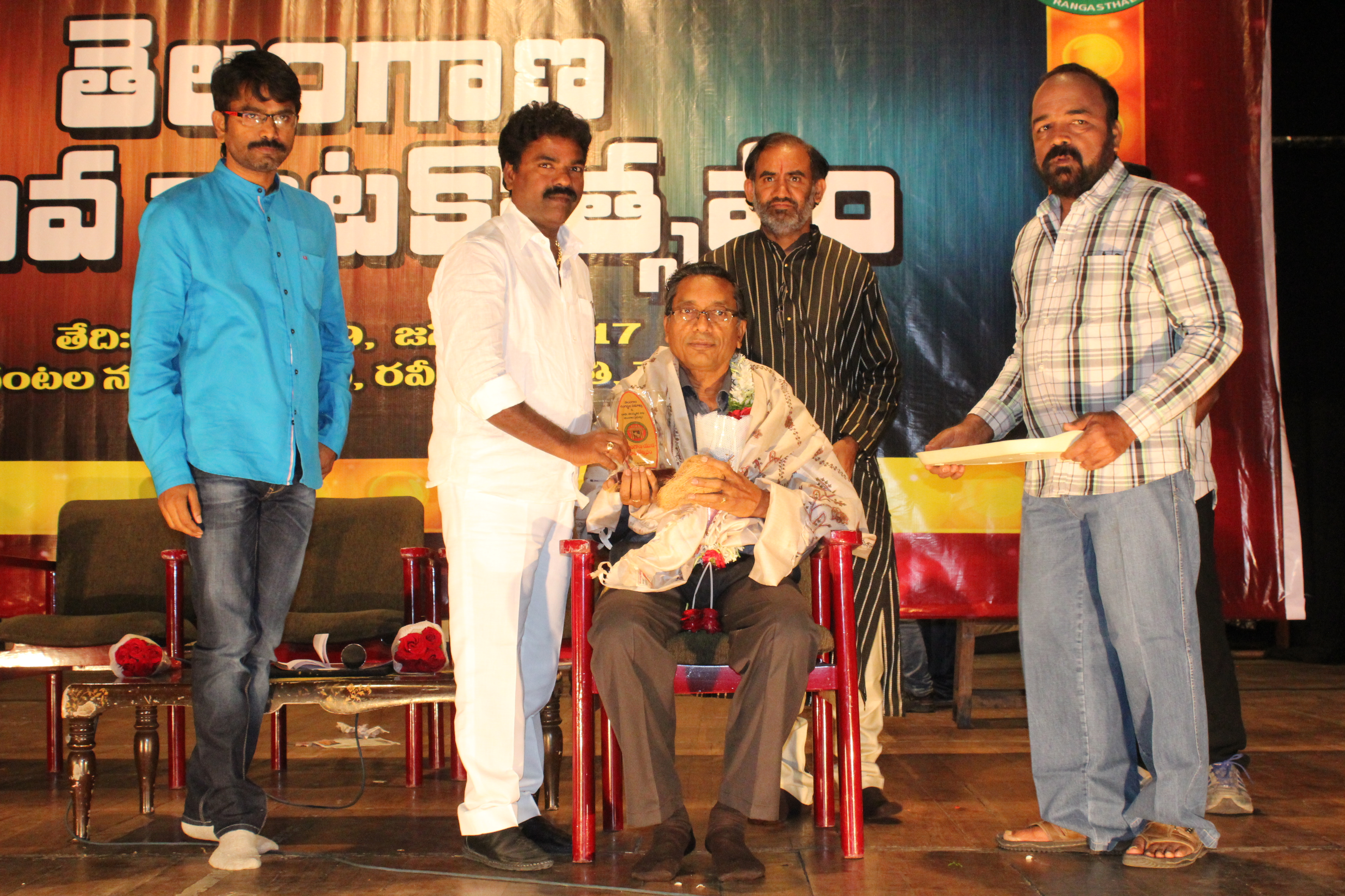 తెలంగాణ రంగస్థల సమాఖ్య ఆధ్వర్యంలో సంగనభట్ల నర్సయ్యకు సత్కారం